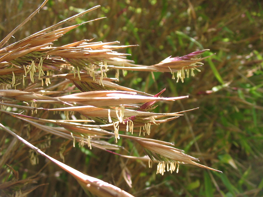 Fotografía realizada por Pablo Alberto Salguero Quiles. Ejemplar de 150 cm. mes de Abríl. En el Real Jardín Botánico de Madrid (España). Zona gramíneas. Name Fargesia nitida (Mitford) Keng f. ex T.P.Yi syn. Sinarundinaria nitida Family Poaceae